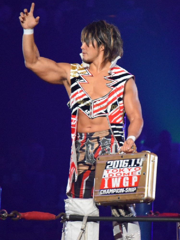 2015年11月7日 大阪府立体育会館 「POWER STRUGGLE」 東京ドーム・IWGPヘビー級王座挑戦権利証の入ったアタッシュケースを保持する棚橋弘至